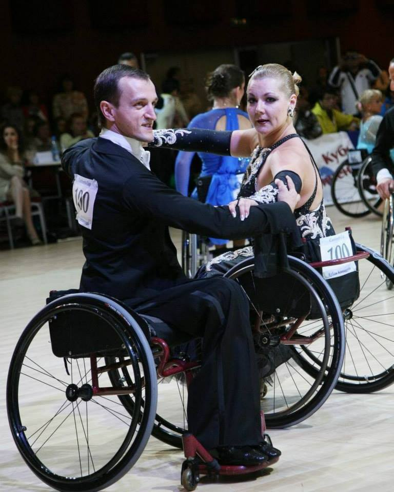 Украинский танцевальный дуэт Иван и Надежда Сивак. Многократные Чемпионы мира по спортивным танцам на колясках. Мастера спорта международного класса. РЦ Инваспорт, г.Ровно, Украина.